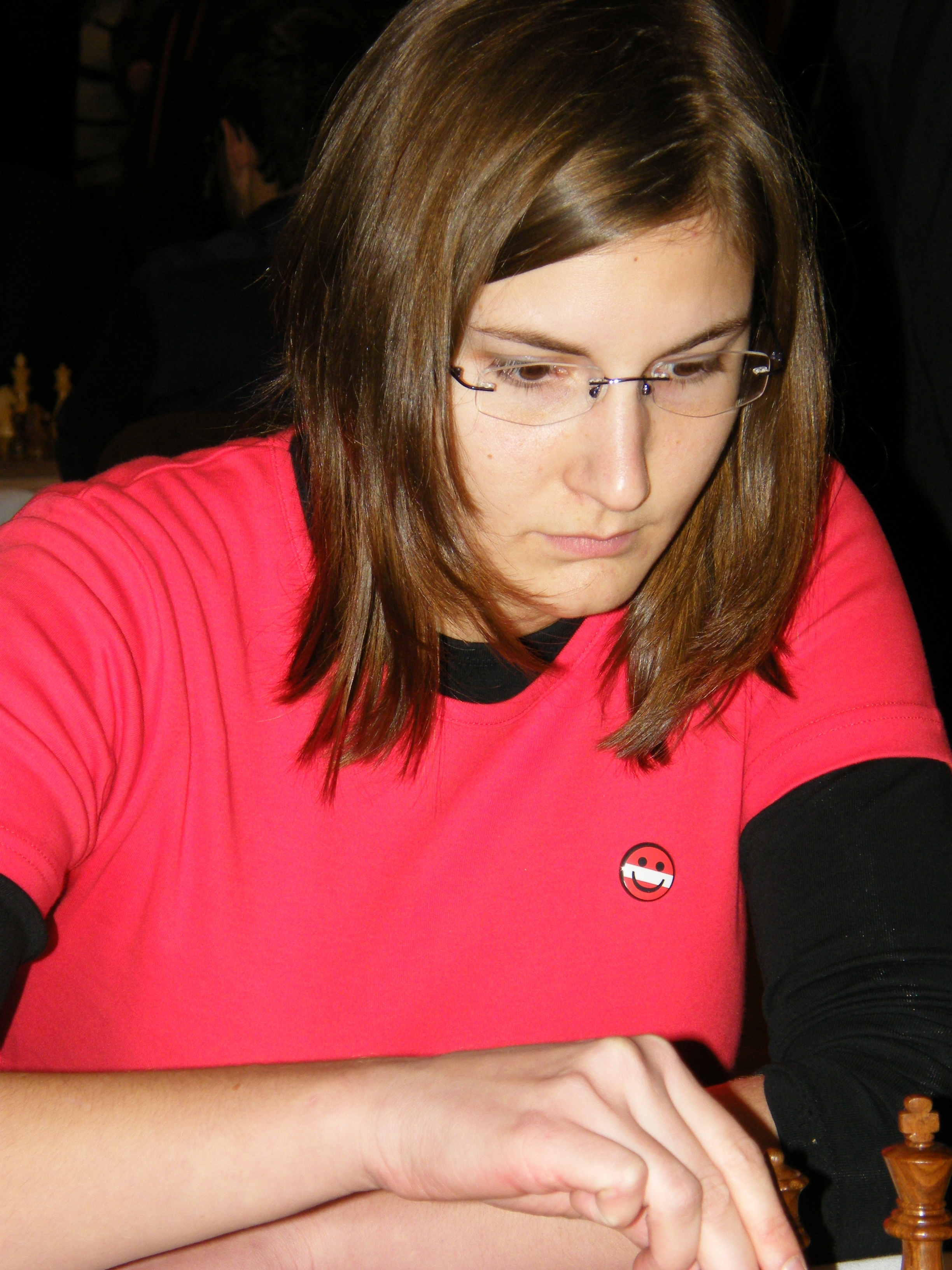 Anna-Christina Kopinits bei der 38. Schacholympiade in Dresden 2008